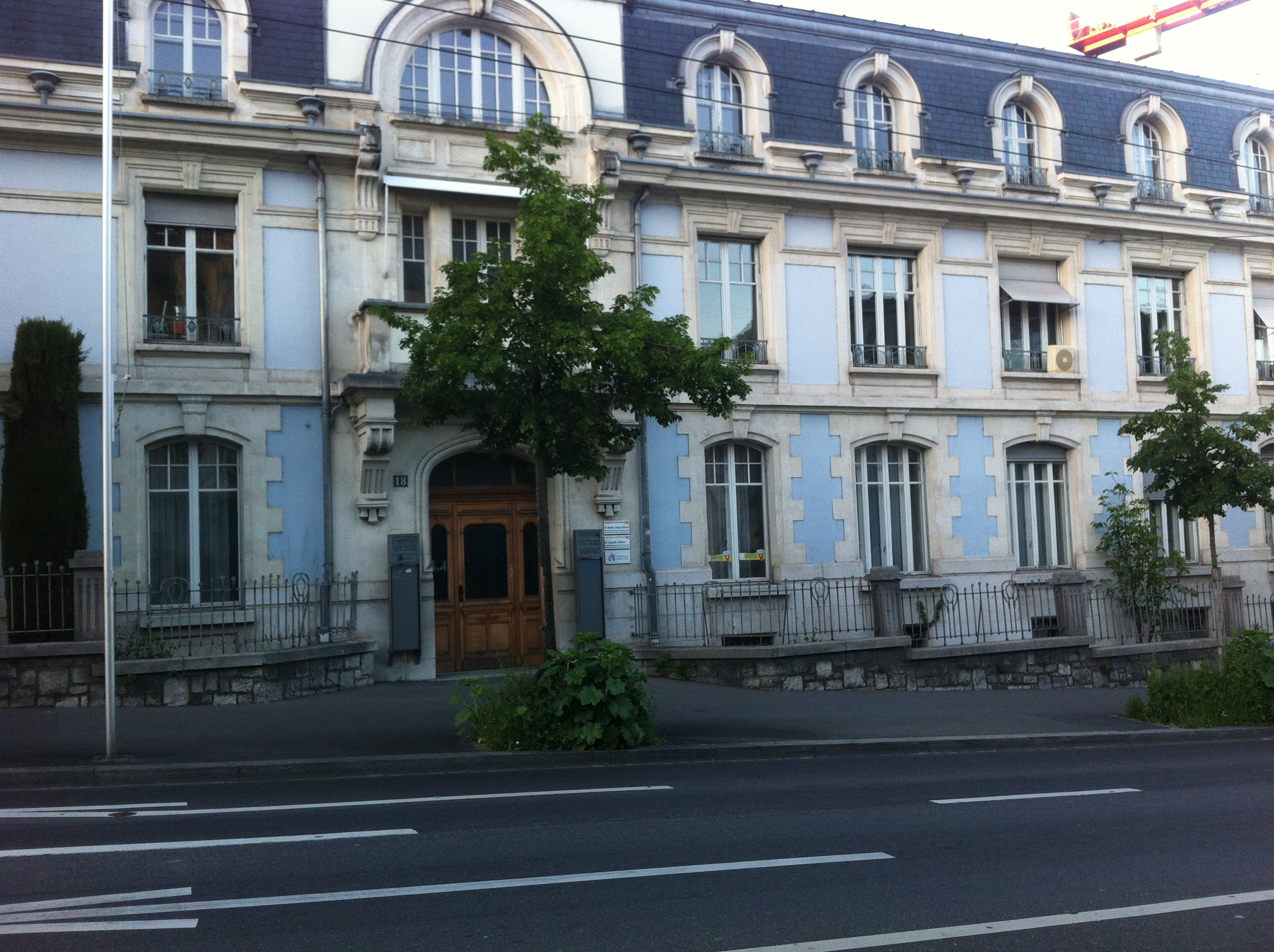 Siège de l'association européenne d'athlétisme.